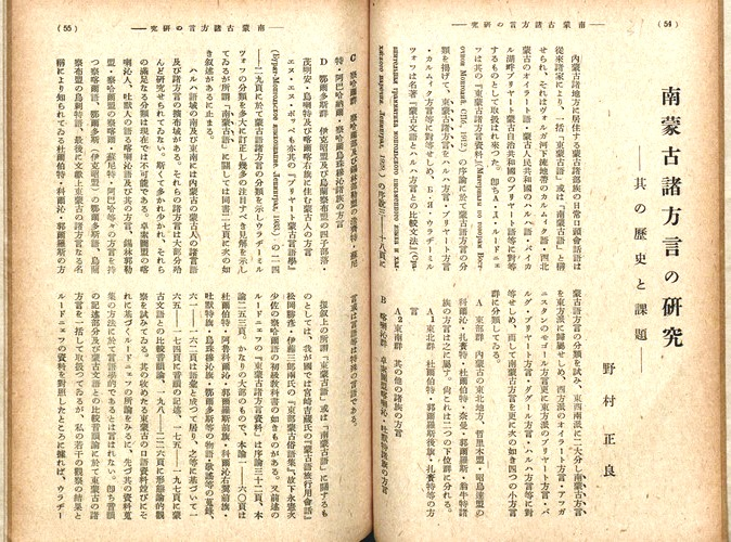 中文（台灣）: 野村正良[撰]（昭和16年10月）。[南蒙古諸方言の研究 : 其の歷史と課題]。